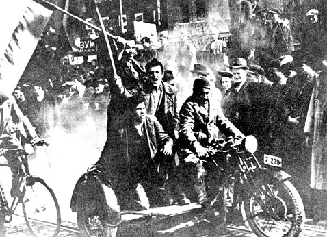 Srpskohrvatski / српскохрватски: Demonstracije 27. marta 1941. godine u Beogradu protiv vlade Cvetković-Maček koja je prišla Trojnom paktu.